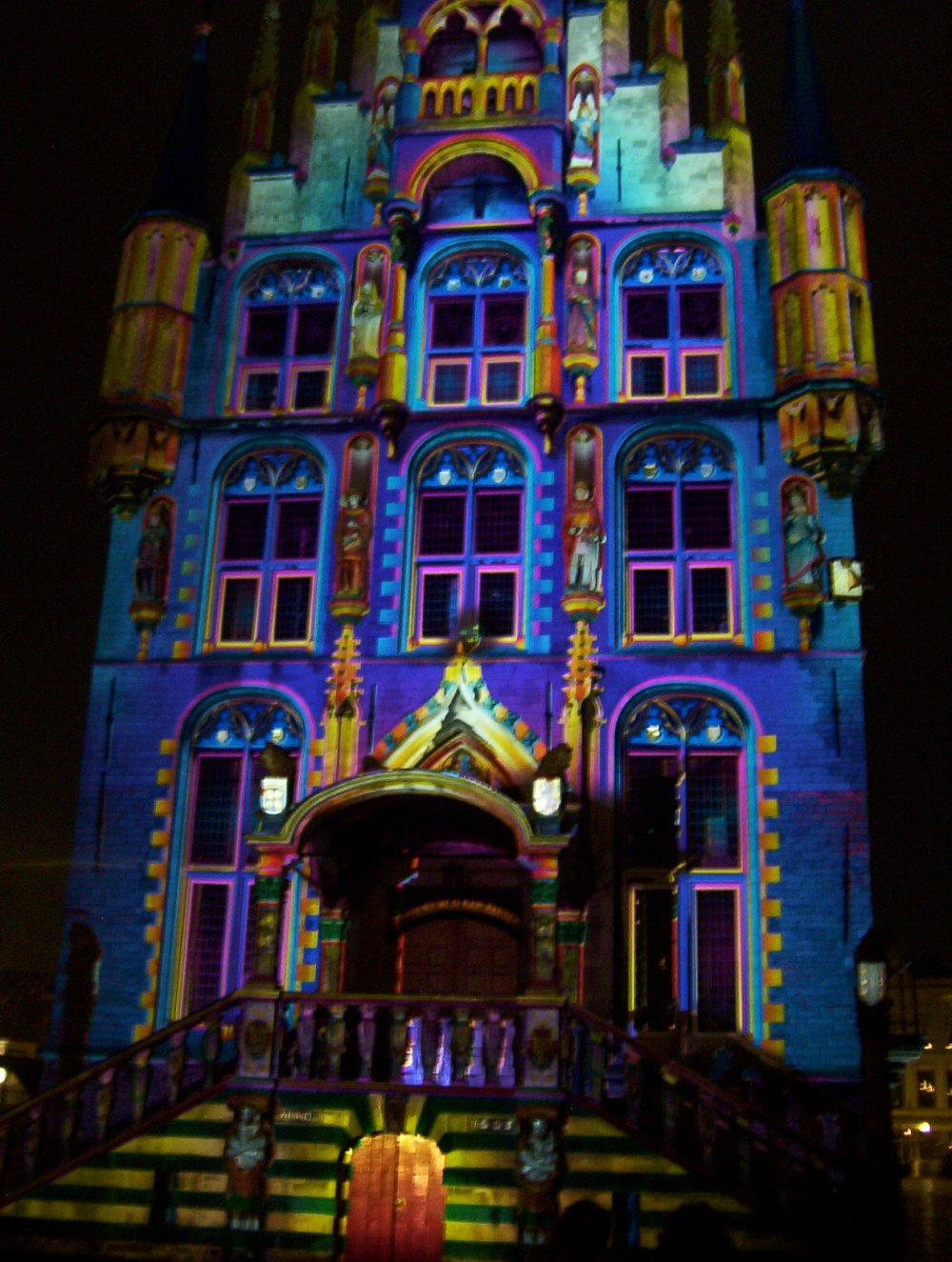 Eigen foto, beschikbaar onder GFDL